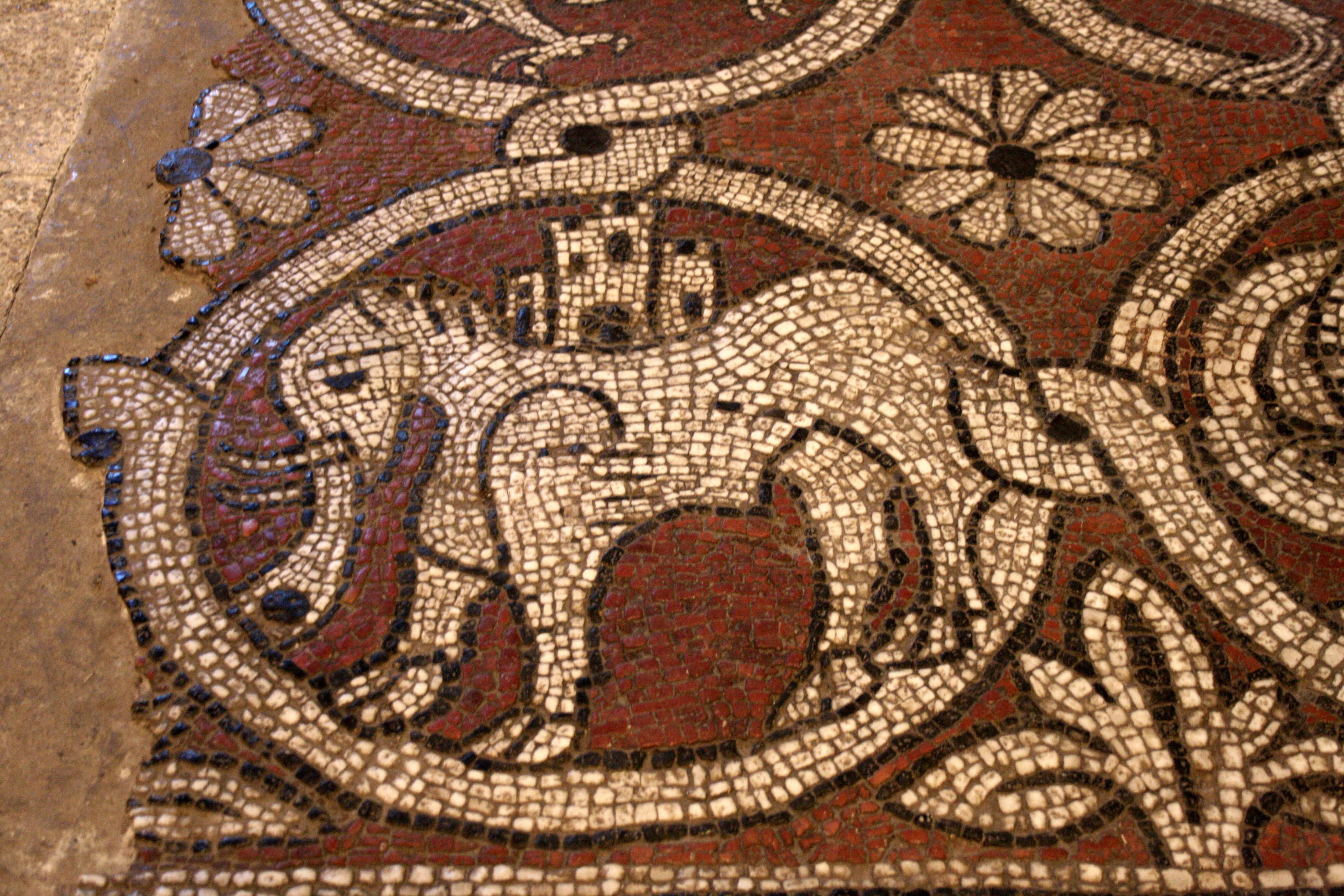 Prieuré de Ganagobie, département des Alpes de Haute-Provence (France). Eglise Notre-Dame (XIIe siècle). Mosaïque romane du transept (1122 à 1129)